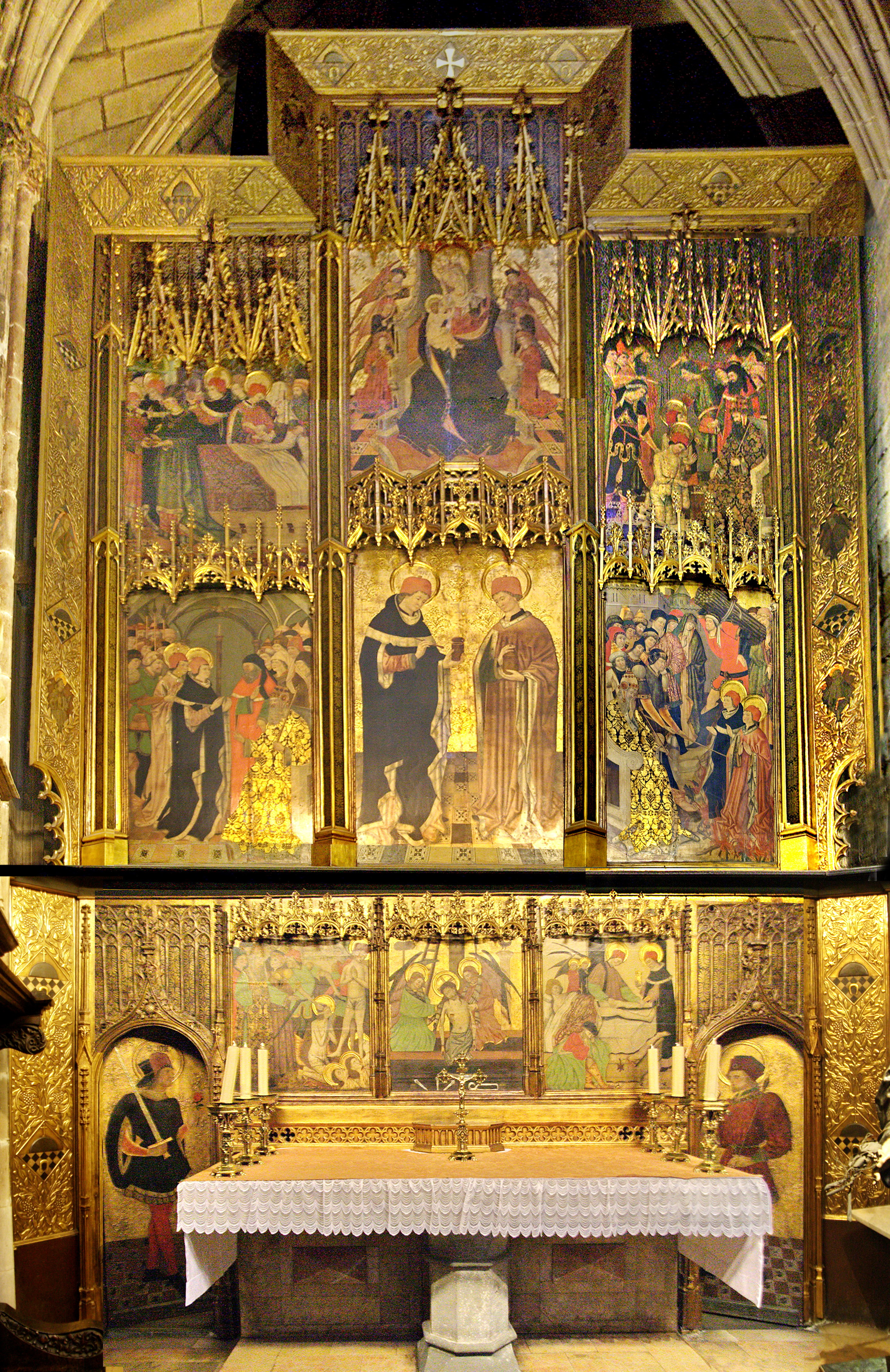 Retaule gòtic dels sants Cosme i Damià, obra de Miquel Nadal (1453)